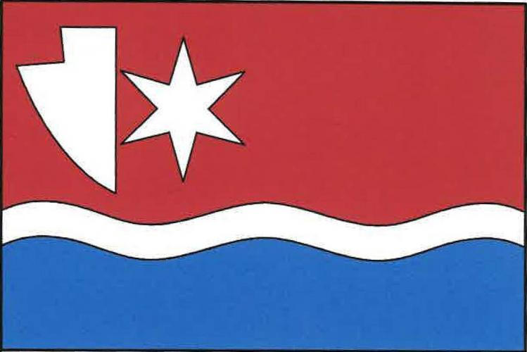 vlajka, Vidonín, okres Žďár nad Sázavou